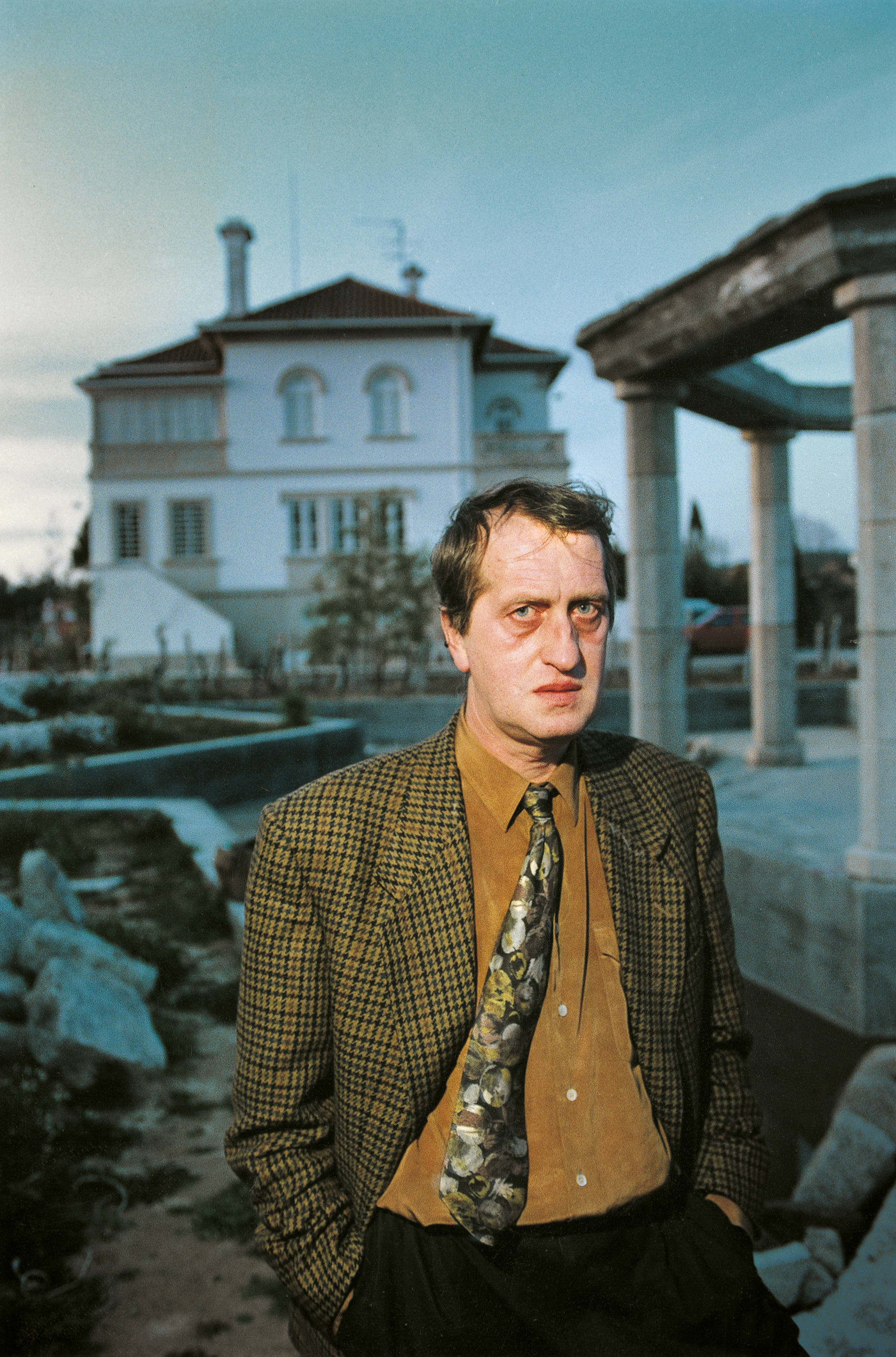 Gerrit Komrij voor zijn huis in Vila Pouca Da Beira, 1994